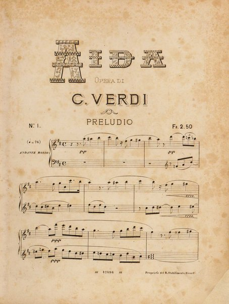 Franco Faccio, riduzione dello spartito del preludio dell'Aida di Giuseppe Verdi. Milano : Edizioni Ricordi, [1872?]